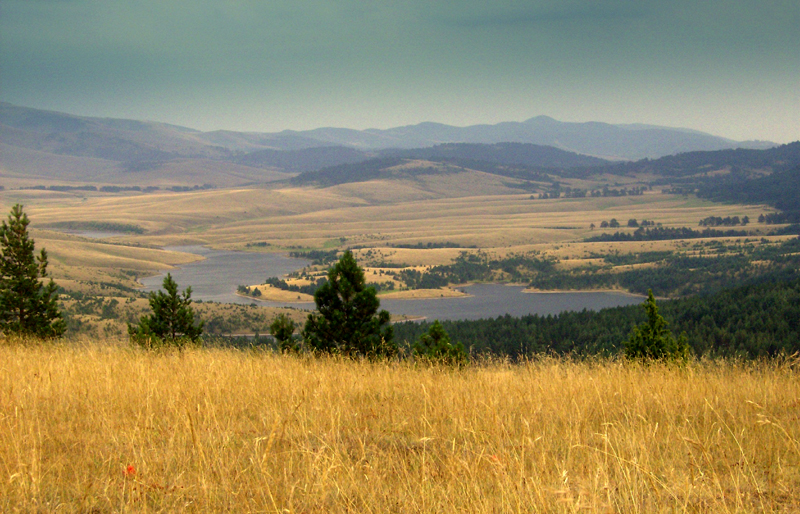 Ribničko jezero on Zlatibor,Serbia.